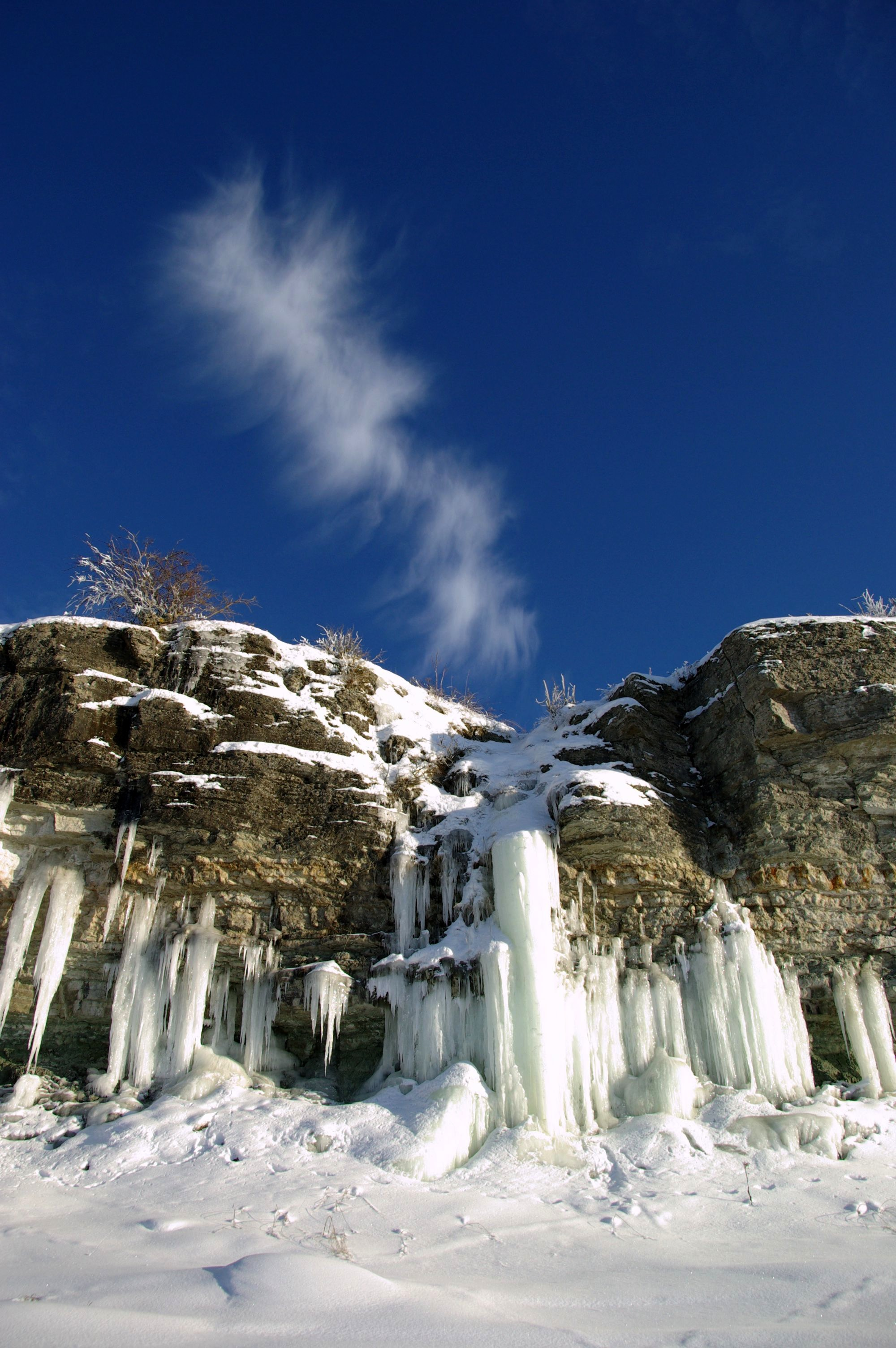 Uuga pank algab Paldiski linnast Muula mägedest ja läheb sujuvalt üle Pakri pangaks